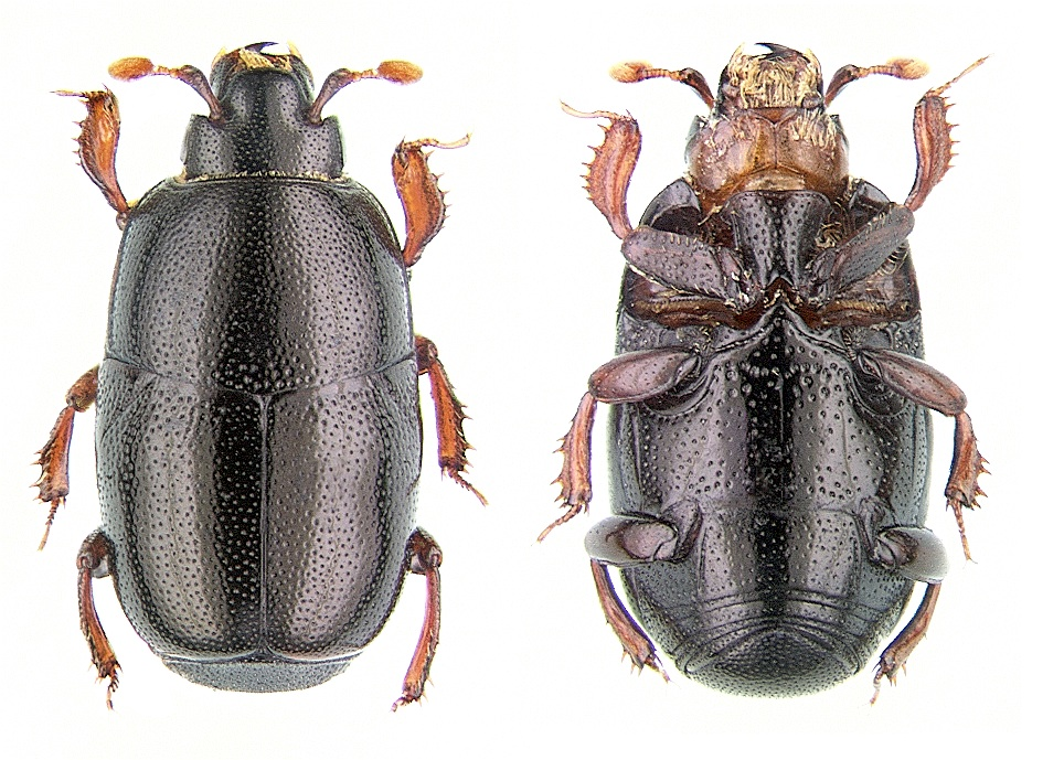 Habitus en vues dorsale et ventrale de Teretrius (Neotepetrius) nigrescens (Lewis, 1891).